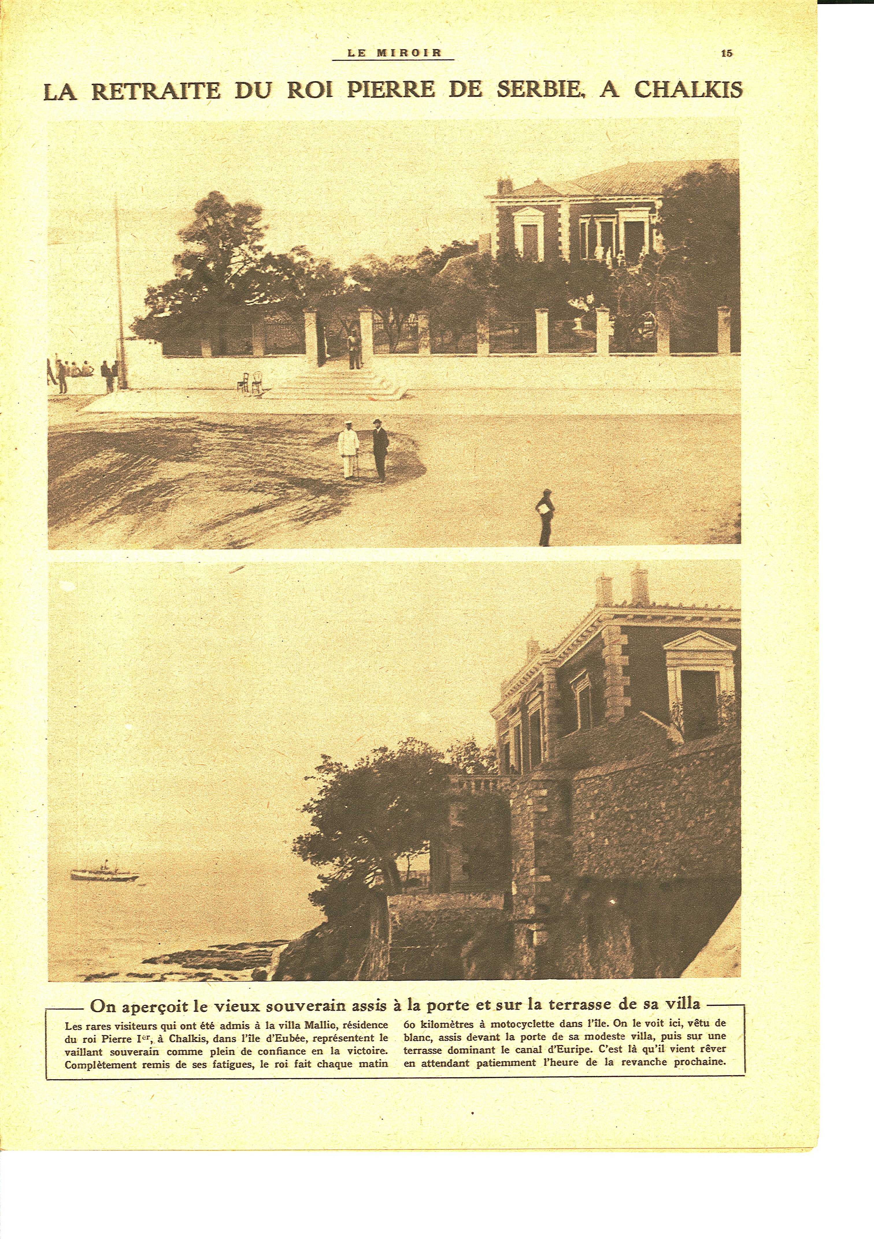 Le Miroir, dimanche 27 août 1916. N°144.